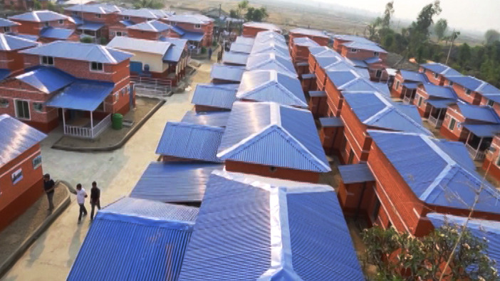 नेपाली: एकीकृत नमूना मुसहर बस्ती